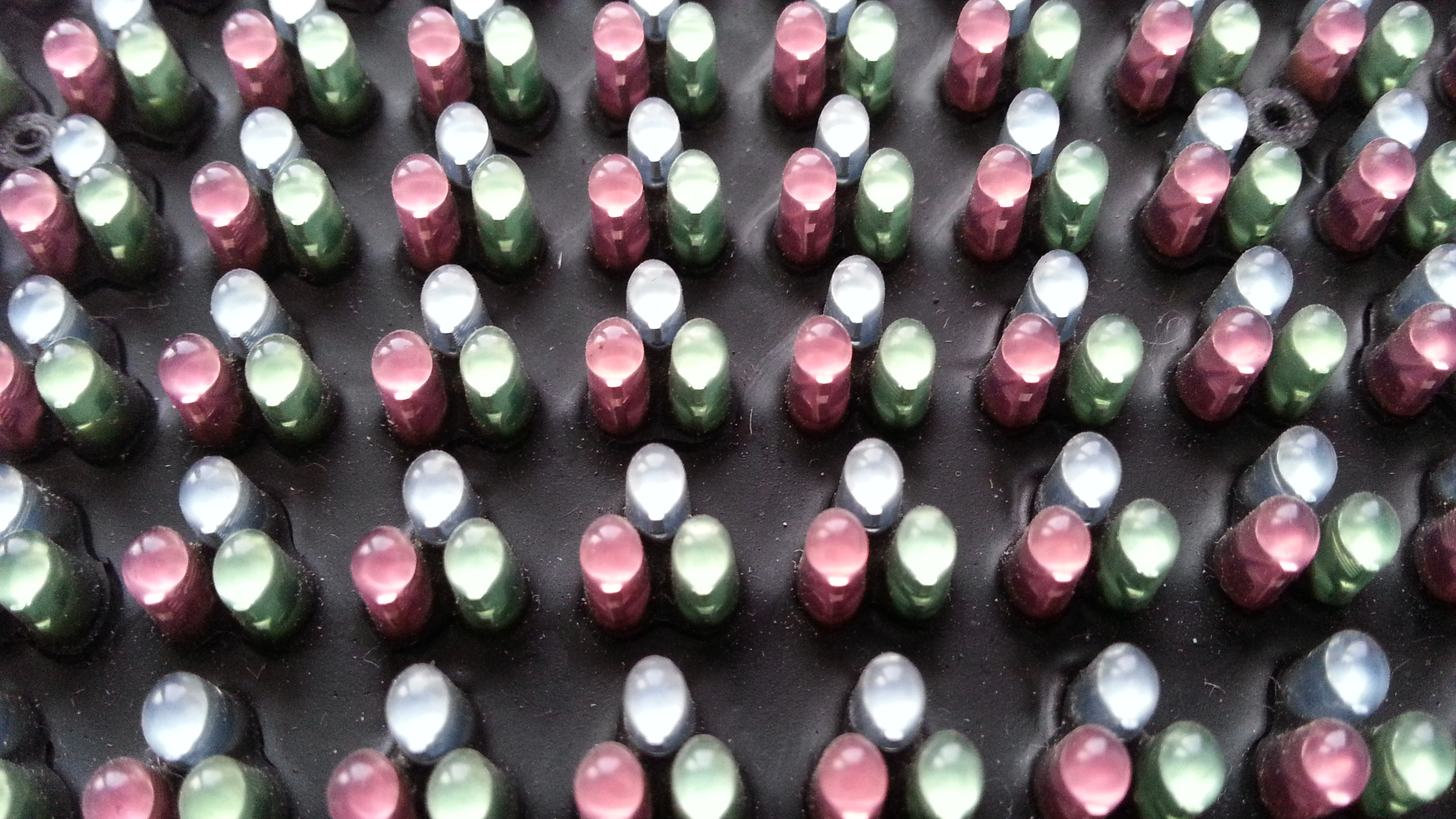 Силикон залит вплоть до головки светодиода